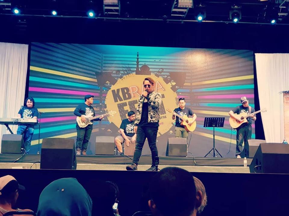 Life Petal di Pesta KB